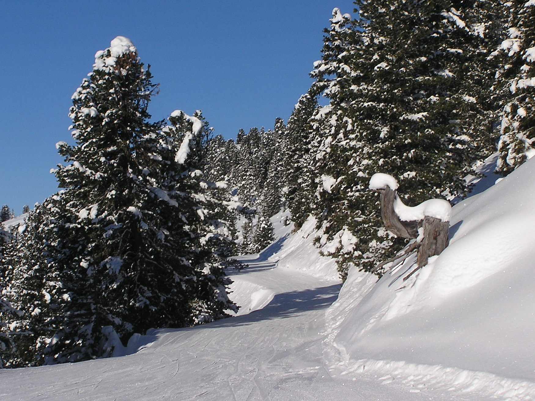 Ein Ziehweg im Schigebiet der Zillertalarena